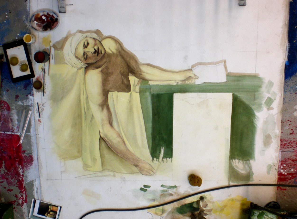 Nächster Arbeitsschritt nach der Tinterung des Maratprospektes. Aufbringen der Farblasuren.